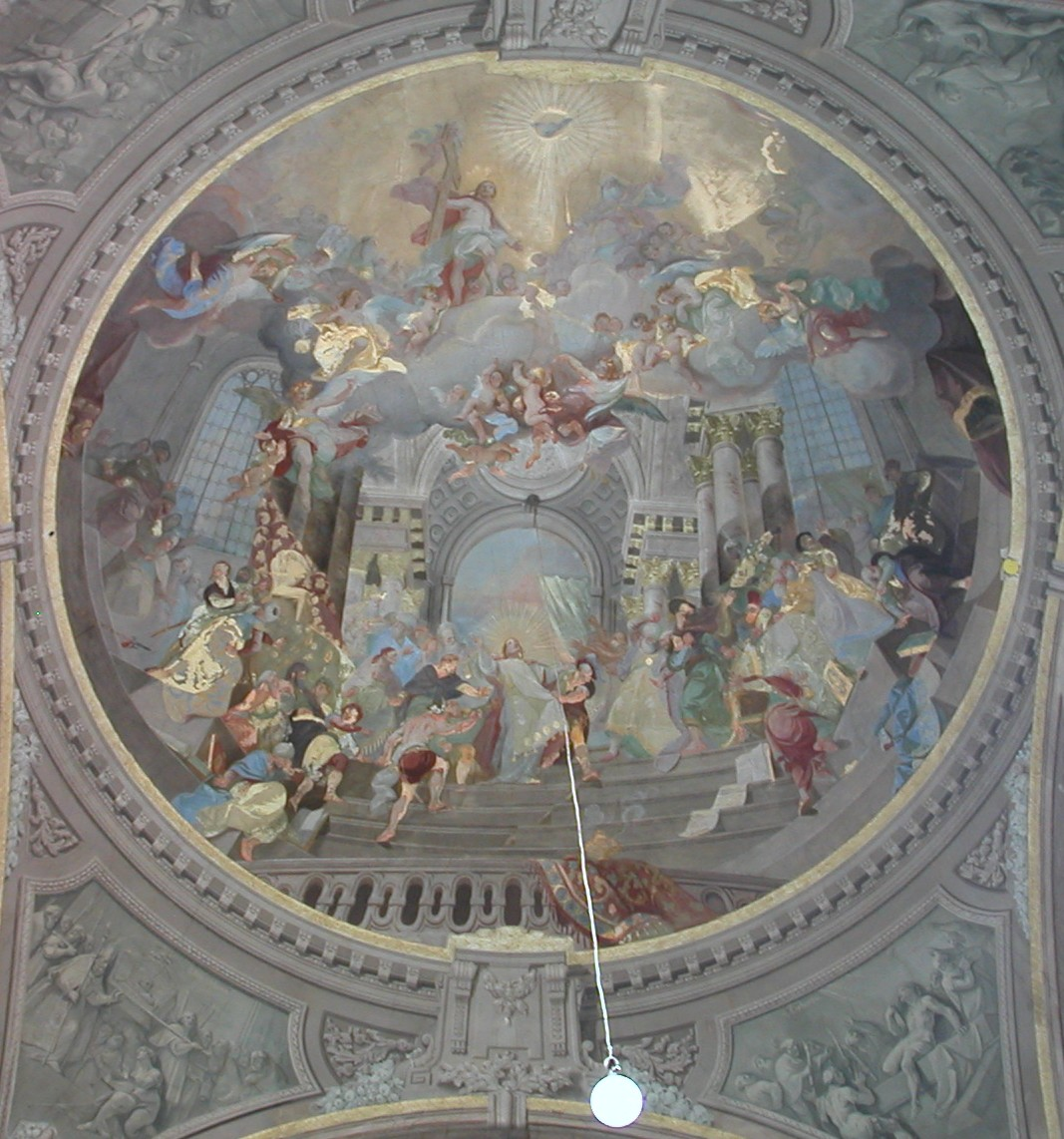 Deckenfresko in der St.-Stephan-Kirche in Pápa / Ungarn: Himmelsvision und Festnahme des Stephanus (Apg. 7,54-57